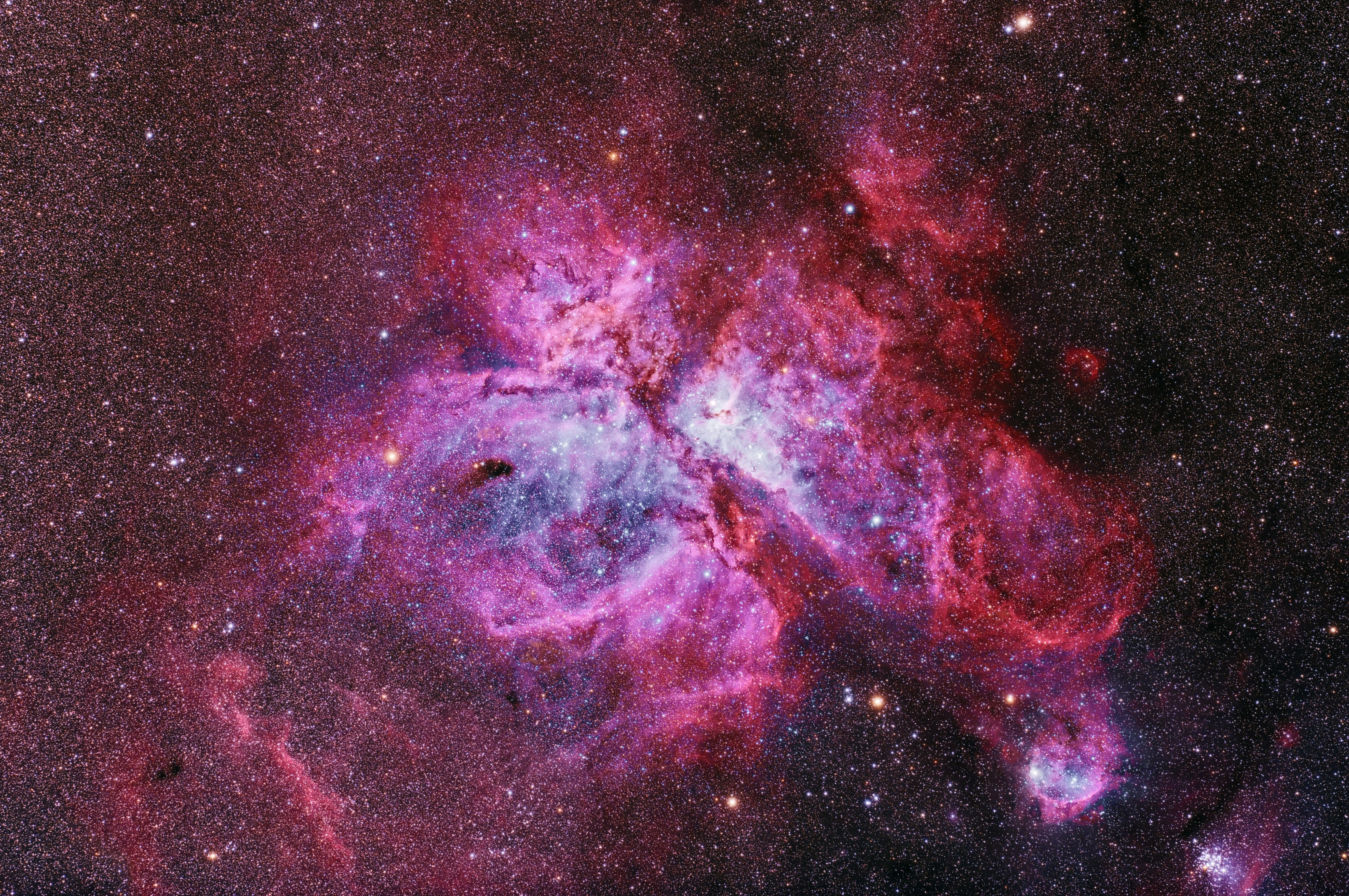 NGC 3372, Aufgenommen mit einem Takahashi FSQ106, 43x60sec auf der Tivoli Astrofarm in Namibia.